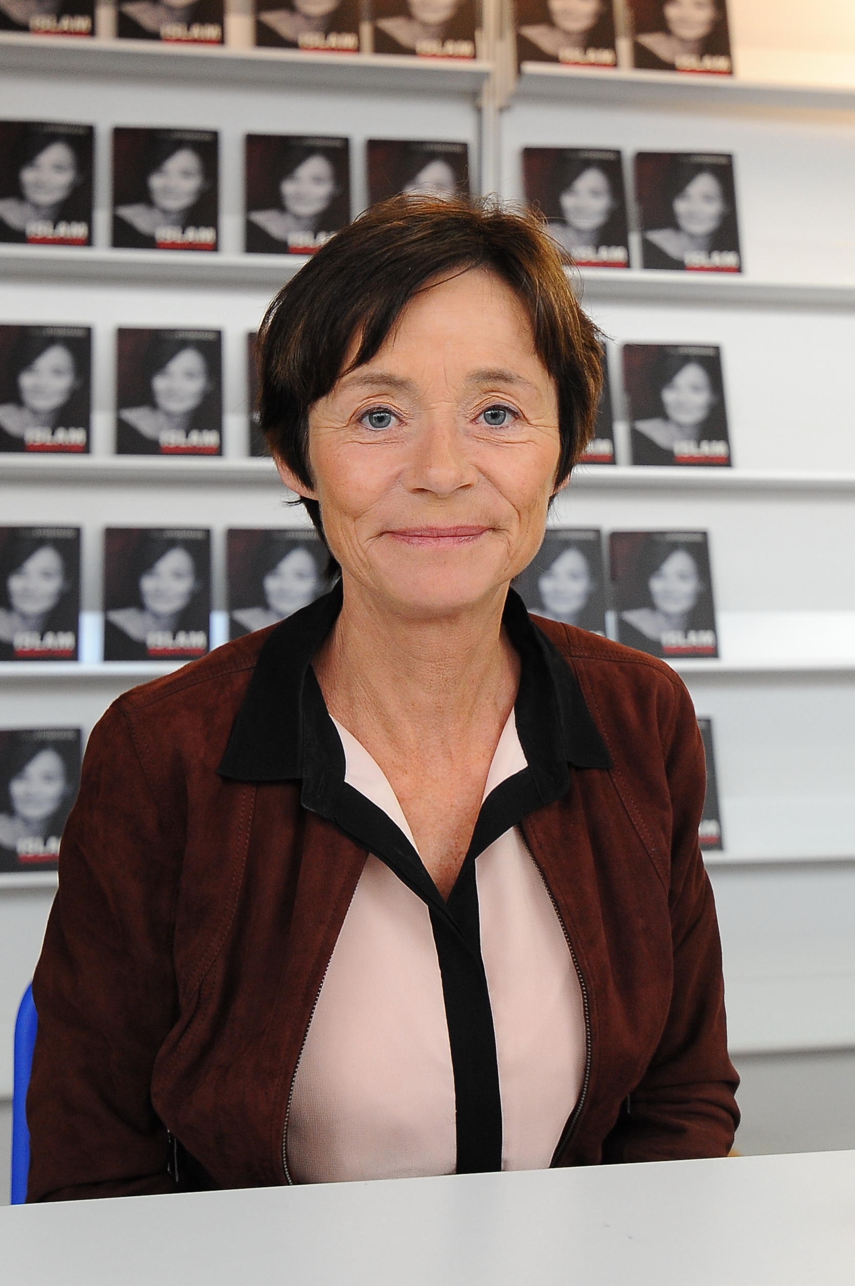 Norweska dziennikarka Hege Storhaug podczas Warszawskich Targów Książki 2017.